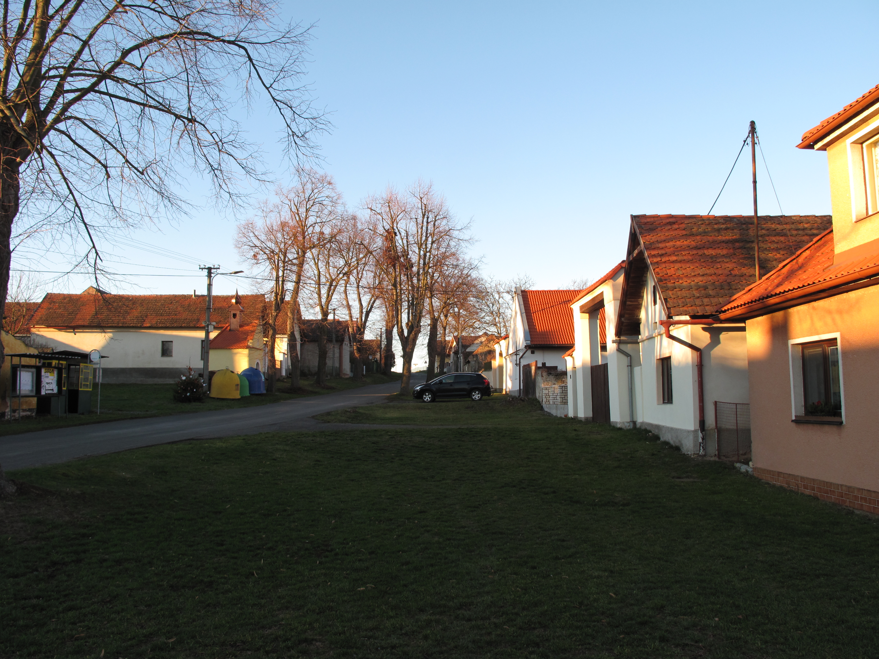 Domy v Kameni. Okres Klatovy, Česká republika.